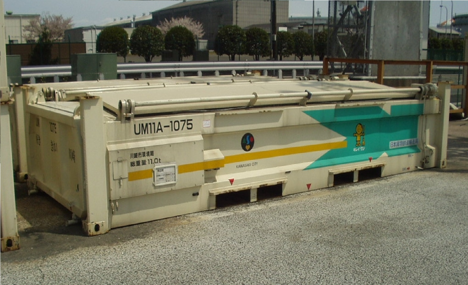 JR貨物より日本国内での鉄道輸送用に承認登録されて、民間企業が所有及び使用している 「 鉄道私有コンテナ 」 。 撮影地＝【神奈川／末広町貨物駅】